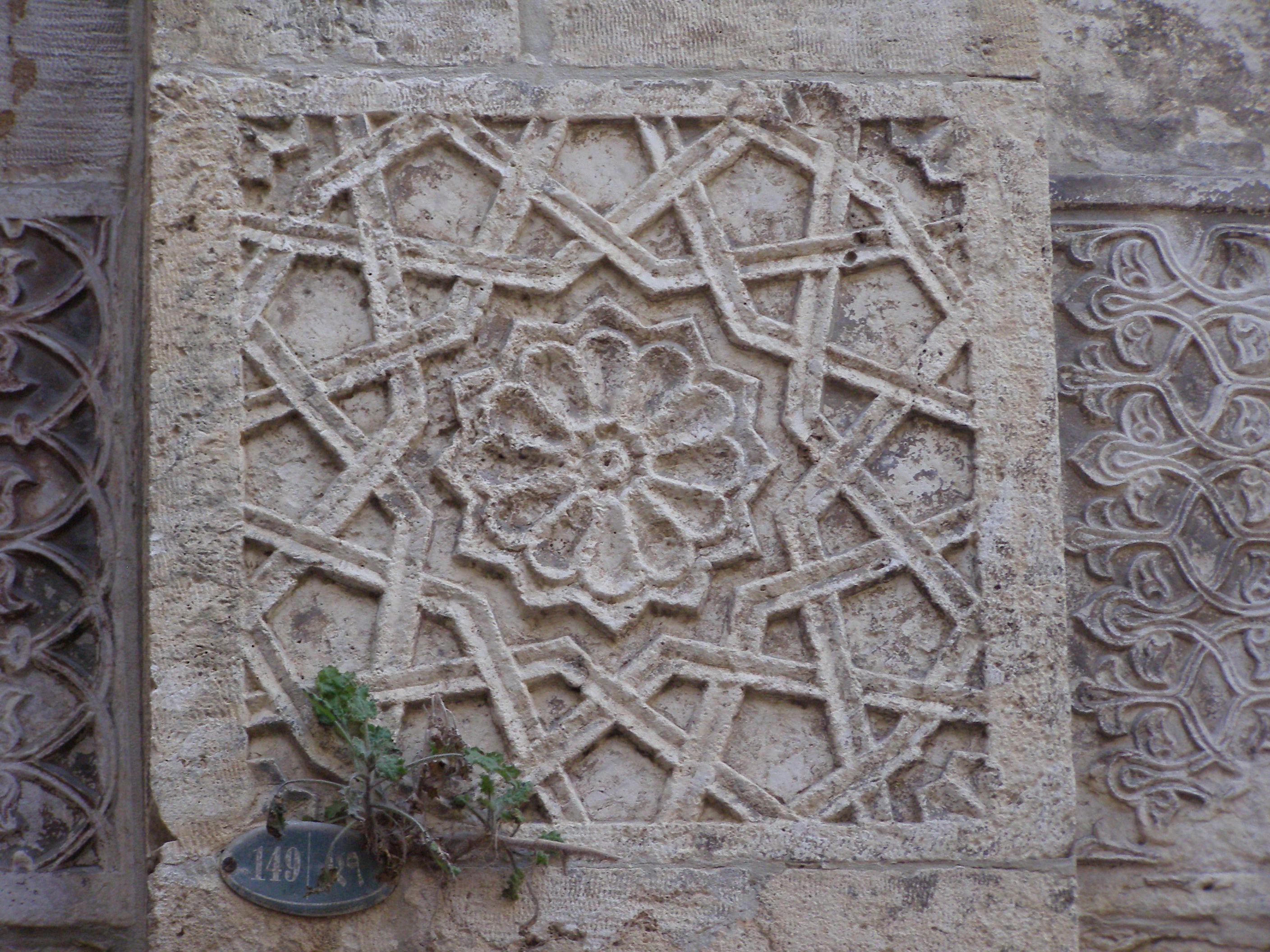 עיטור בתורבת טורקאן ח'תון רישיון נוצר על ידי משתמש:Ranbar